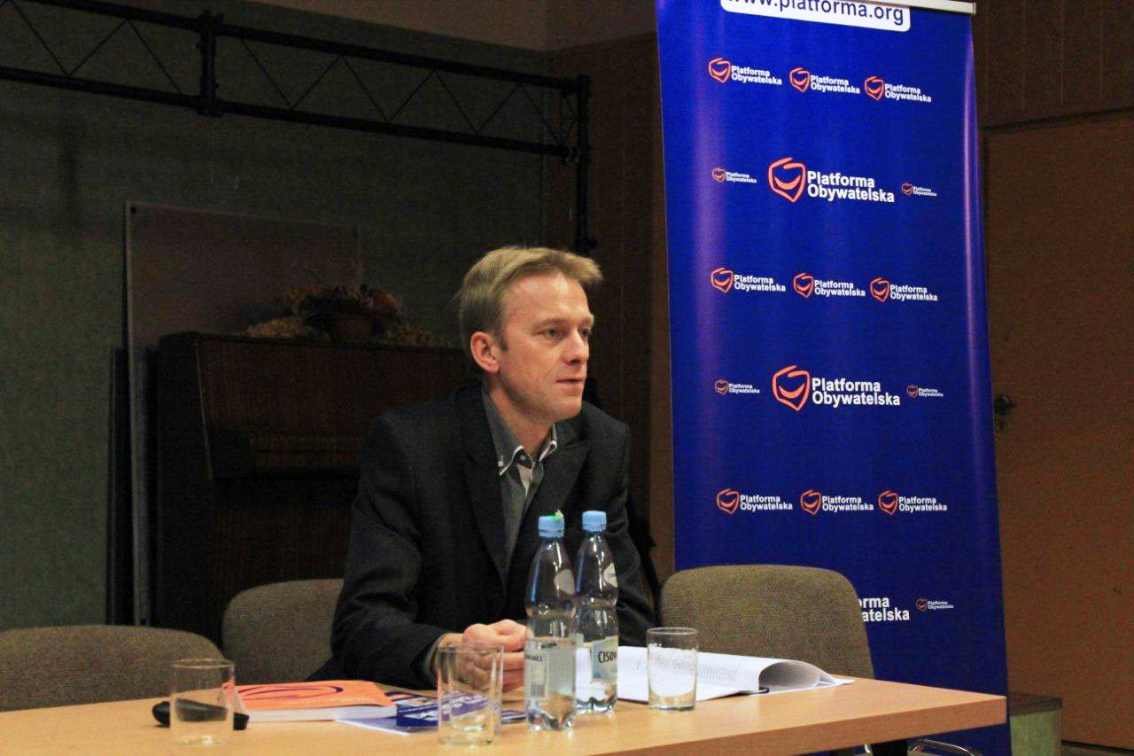 Spotkanie zorganizowane przez Pawła Suskiego - Tuczno, zachodniopomorskie